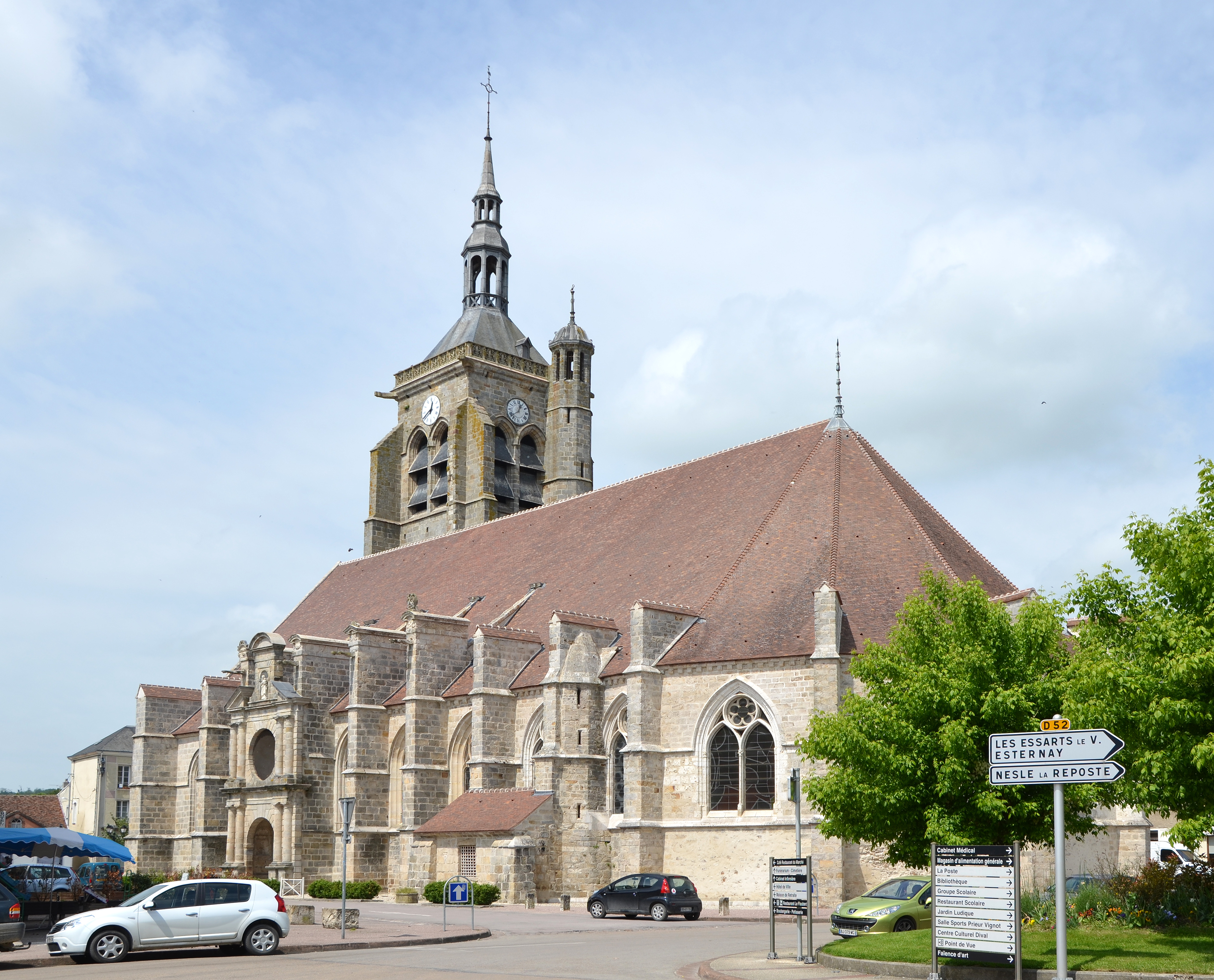 Eglise de Villenauxe-la-Grande, Aube, France